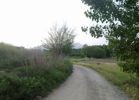 Camino rural entre Láchar y Cijuela junto al Canal del Duque, en el término municipal de Láchar (Granada, España). Recorte de una foto hecha por mí.